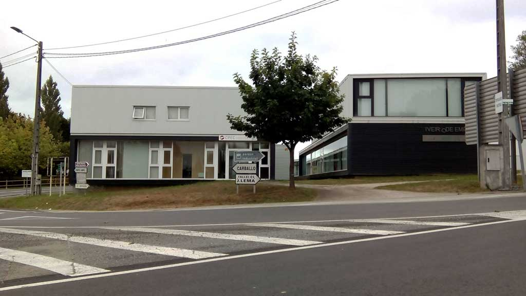 Vista do Polígono de Bértoa, Carballo.